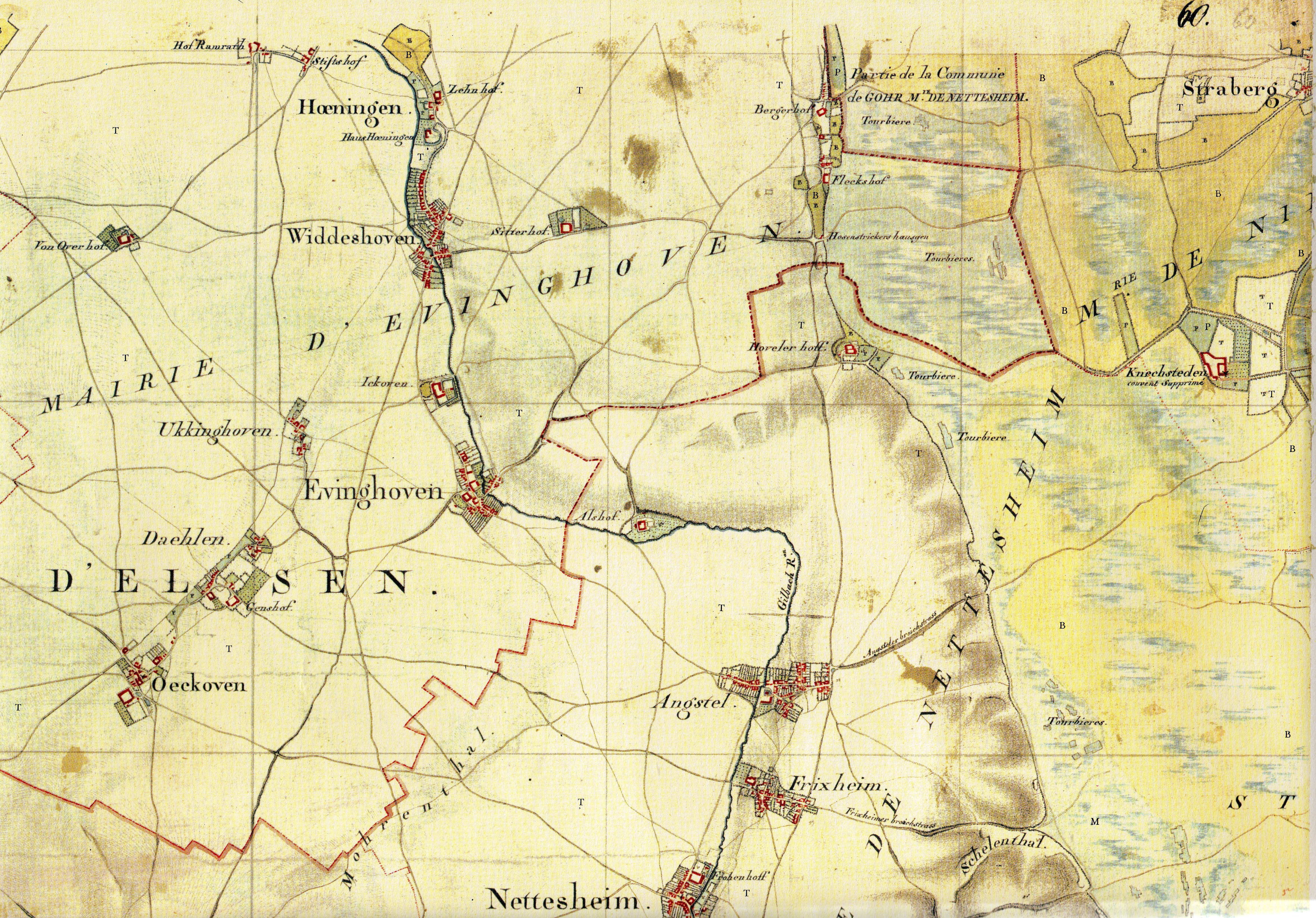 Kartenaufnahme der Rheinlande durch Tranchot und von Müffling